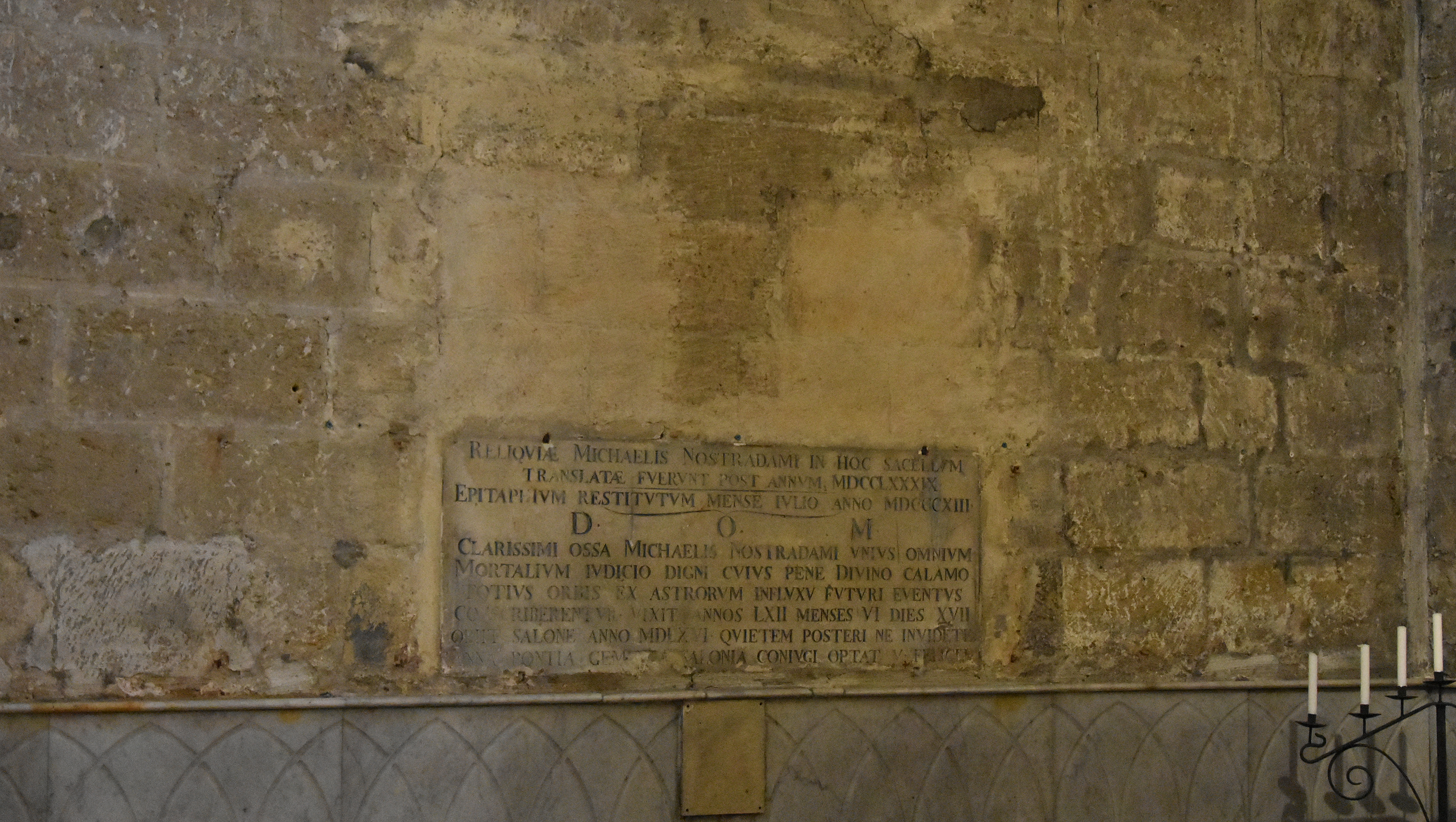 Église Saint-Laurent - graf Nostradamus - Salon-de-Provence 23-05-2018